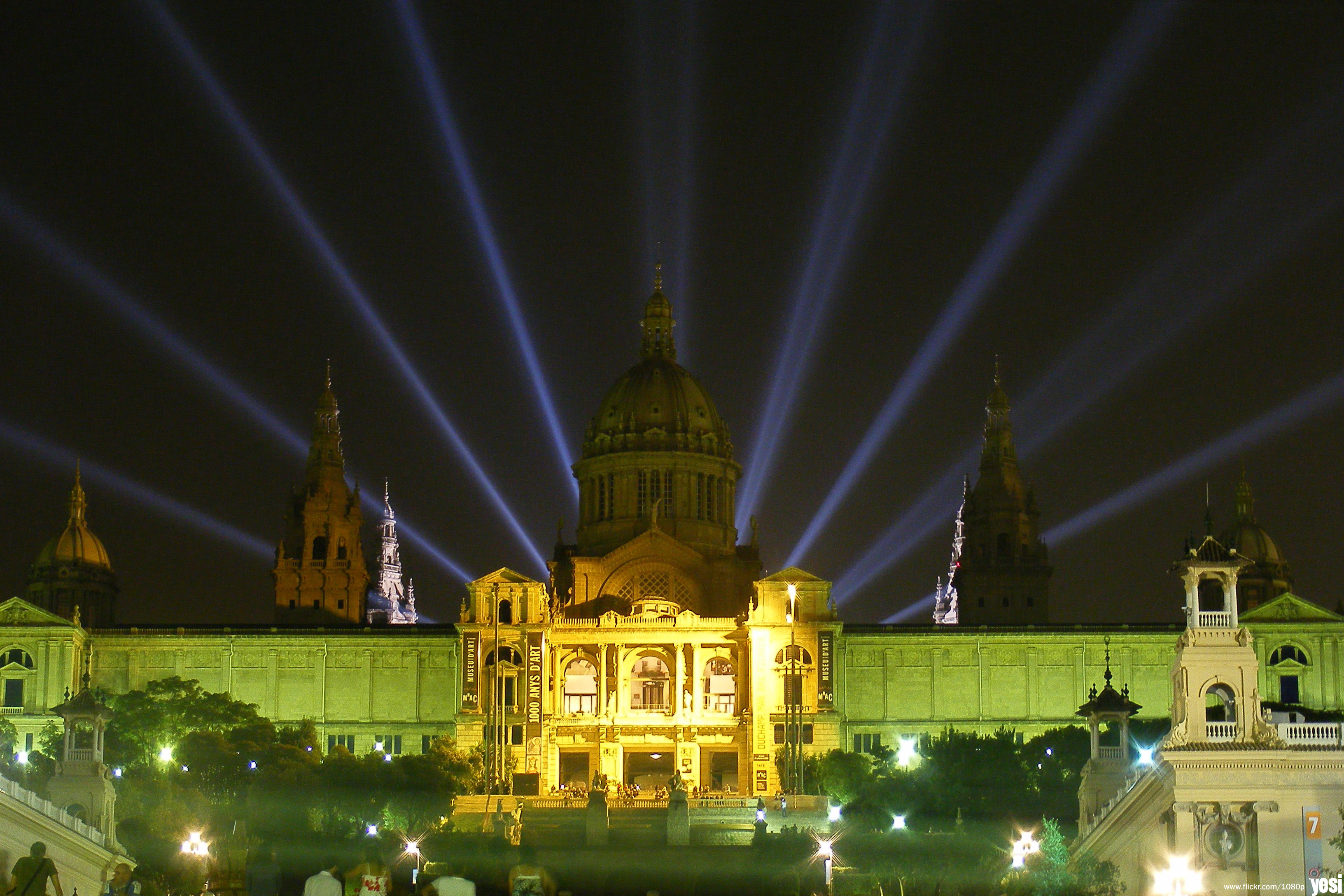 El MNAC (Museu Nacional d'Art de Catalunya) en Barcelona.